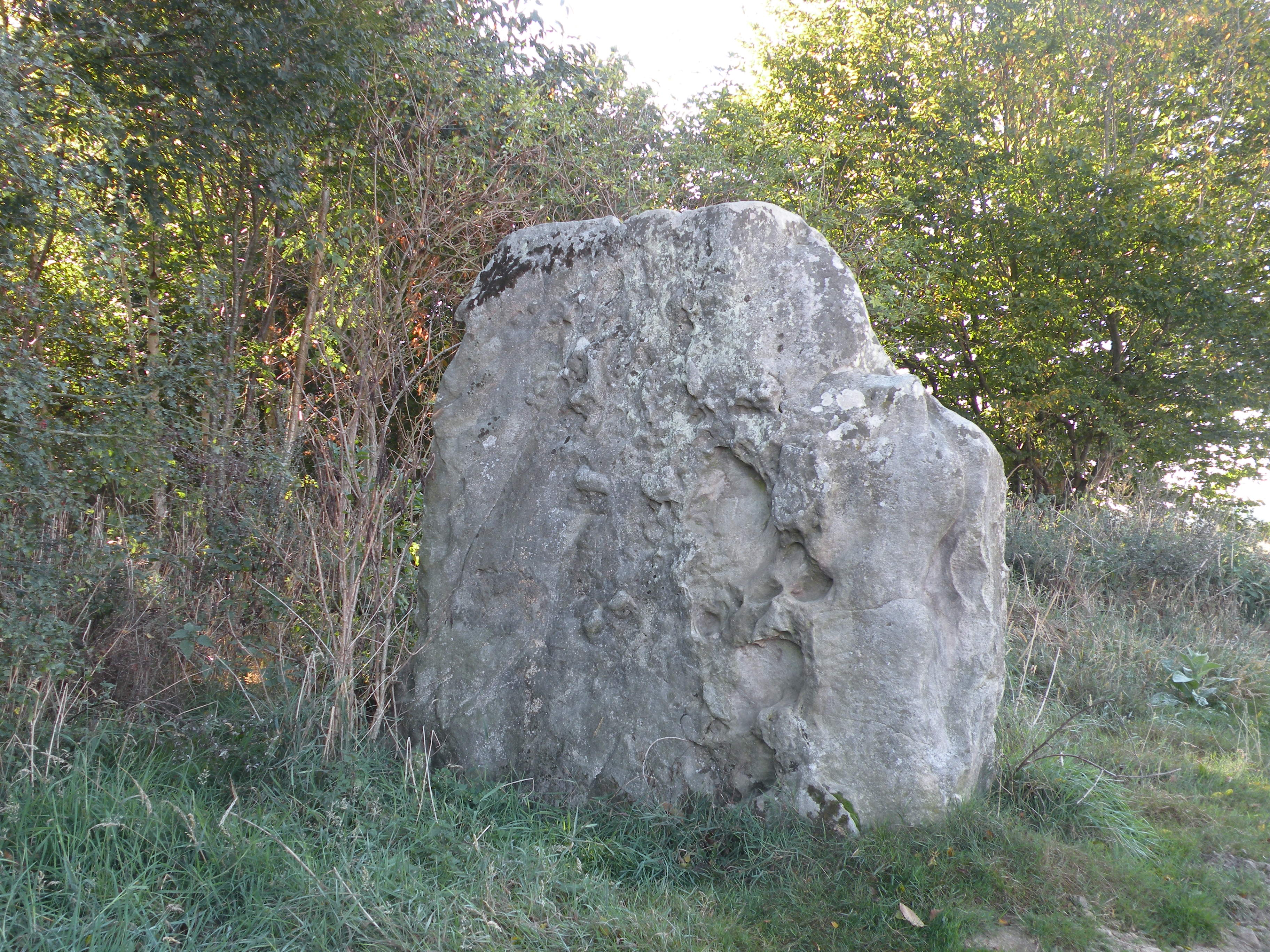 Pierre frite de Lavilletertre